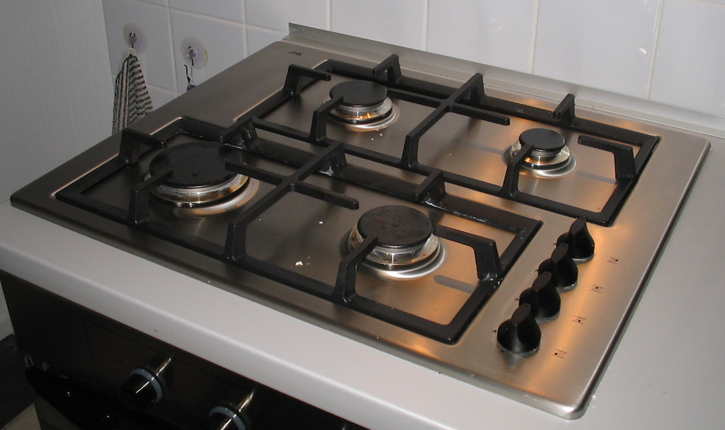 gaskookplaat in mijn keuken